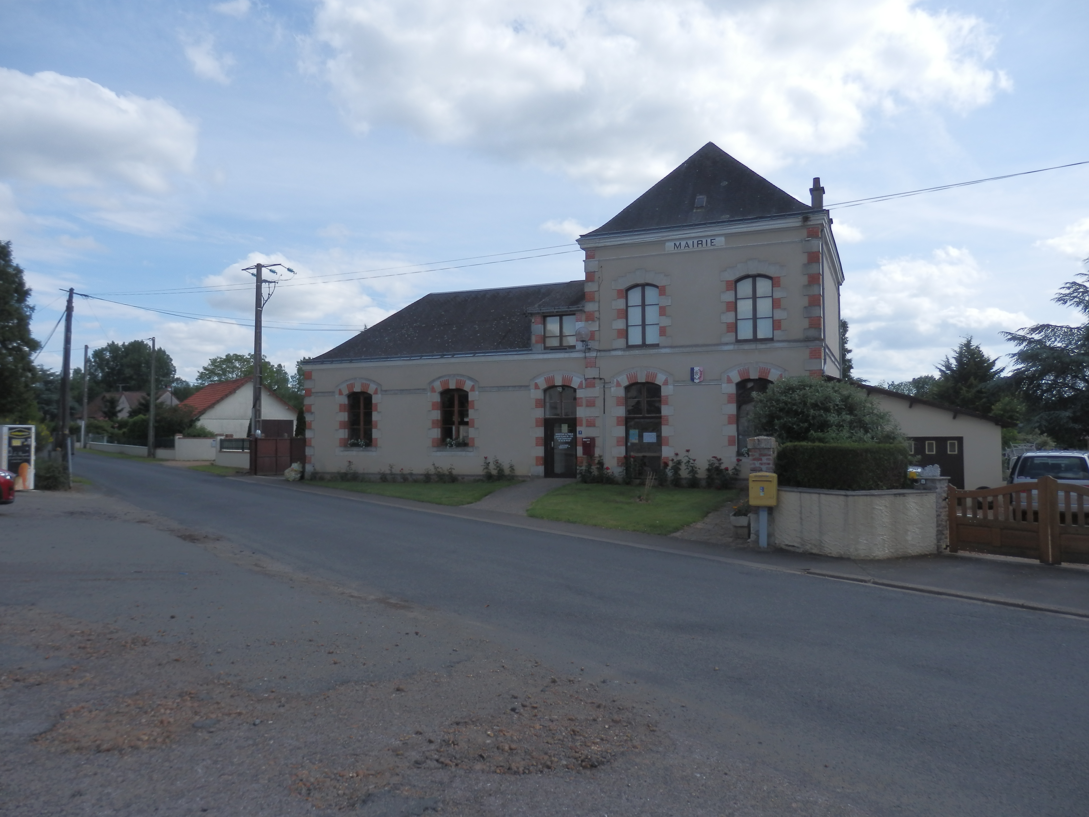 Mairie de Saint-Mars-de-Locquenay